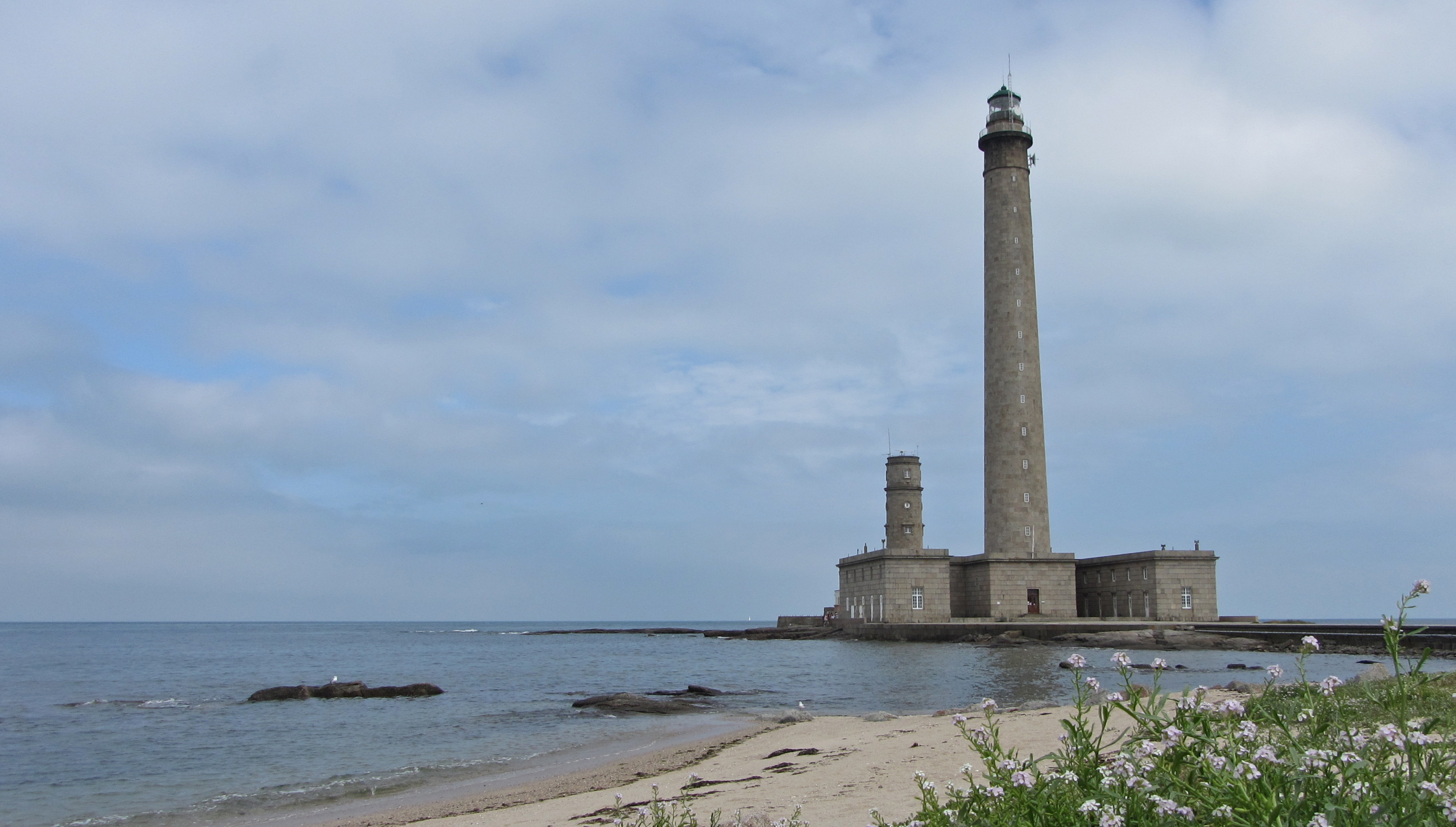 Leuchtturm von Gatteville-le-Phare